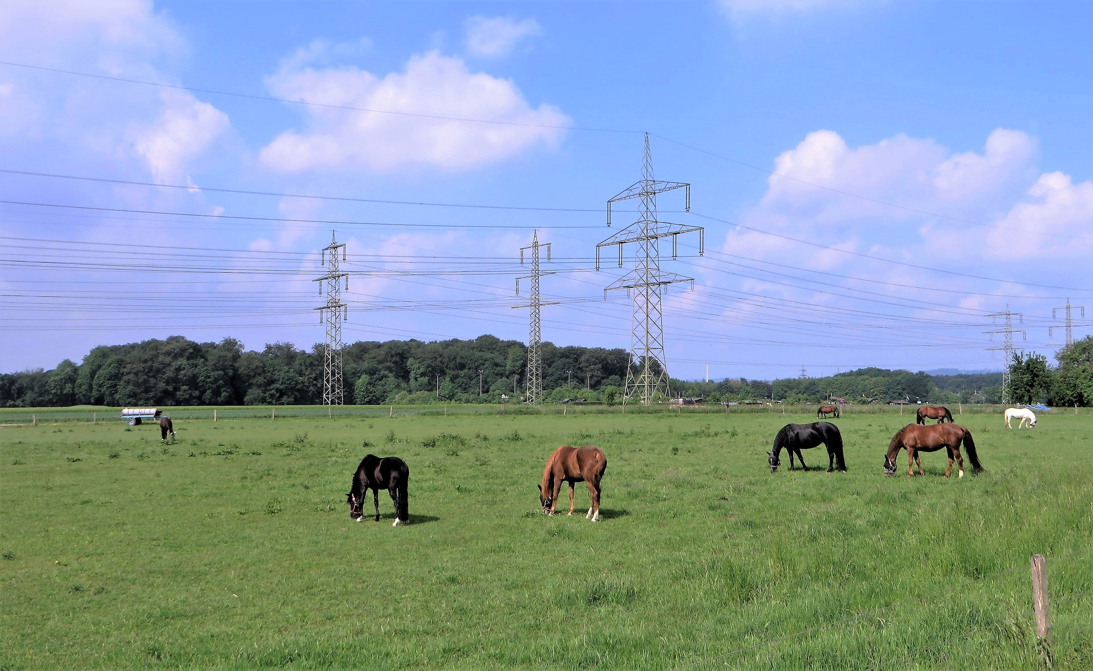 Ländliches Idyll mit Pferdeweide an der Westhofener Straße in Hagen-Garenfeld. Der abgebildete vordere Bereich liegt im Landschaftsschutzgebiet „Garenfeld“. Der Wald im Hintergrund gehört zum Naturschutzgebiet „Lennesteilhang Garenfeld“. Davor drei Freileitungen: 220/110 kV (Bahnstrom), 110 kV (Bl. 2307) und 220 kV (Bl. 2319).